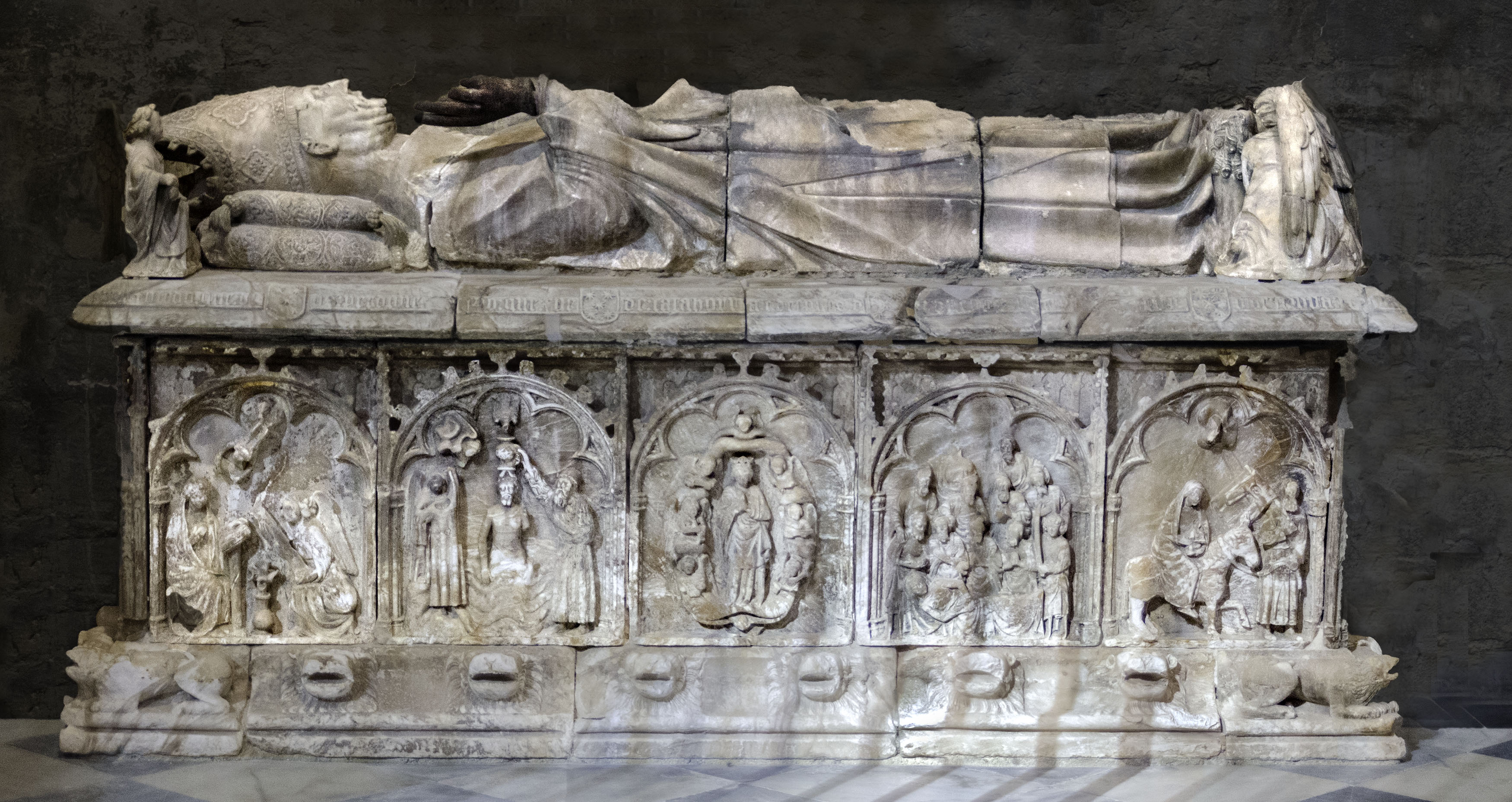 El sepulcro del arzobispo Gonzalo de Mena y Roelas († 1401) está en la capilla de Santiago de la catedral de Sevilla, (España). Es de estilo gótico, y fue tallado en alabastro en el año 1401.